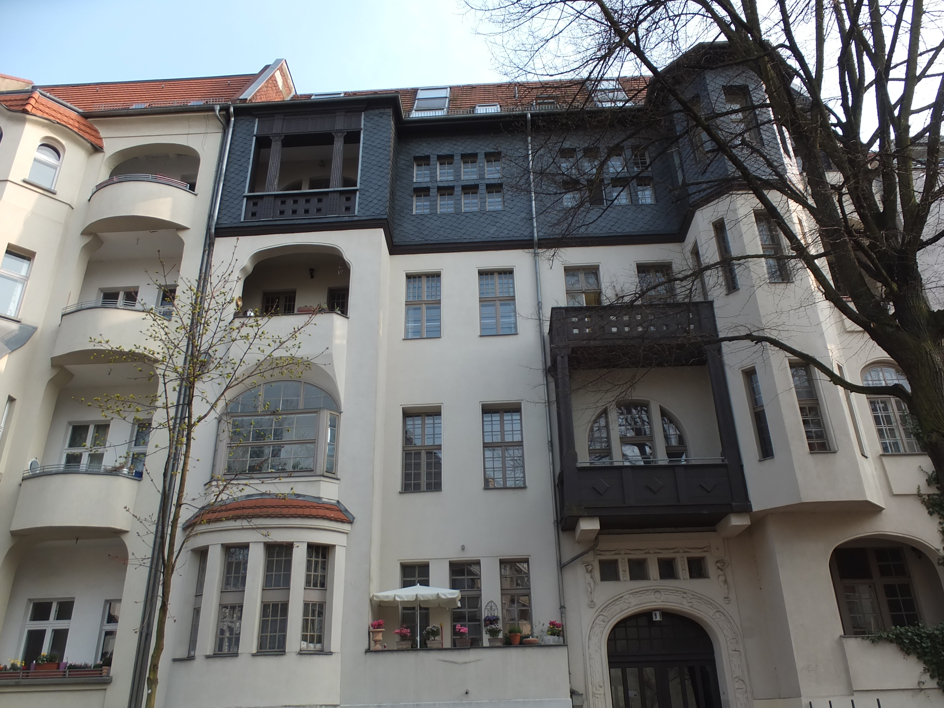 Denkmalliste Berlin OBJ-Dok-Nr.: 09020155 – Berlin Oberschöneweide Helmholtzstraße 5/9, Mietshäuser und Ateliergebäude, 1903-07 von Max Stutterheim. Das Bild zeigt das Gebäude Helmholtzstraße 9.